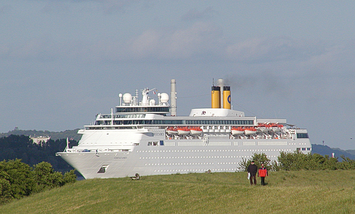 Die Costa Classica auf der Elbe